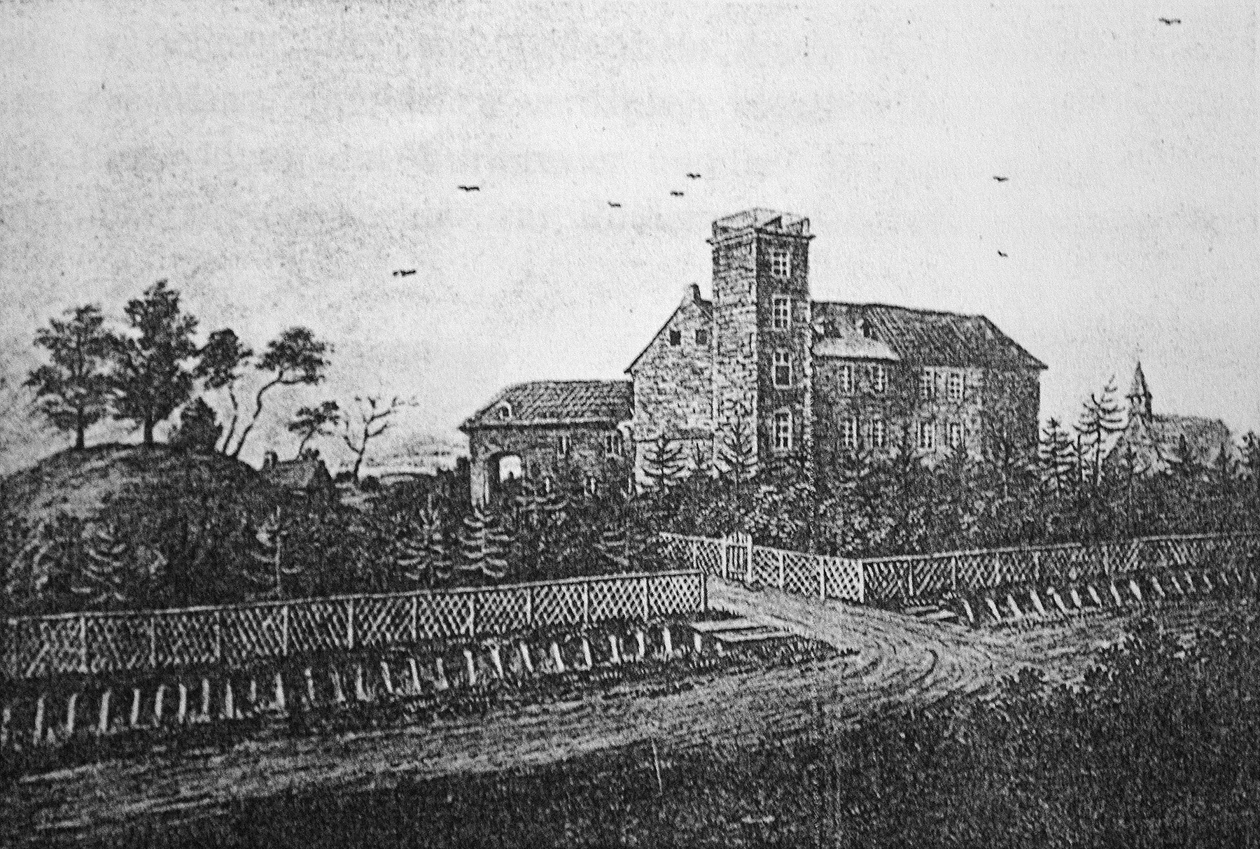 Ansicht des Schlosses Berensbegr in Herzogenrath-Kohlscheid von etwa 1790